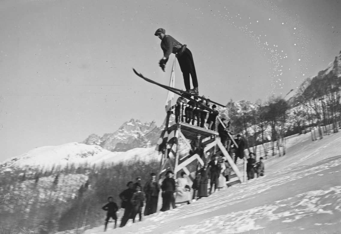 Chamonix, 2/2/24, [Franz] Wende, tchécoslovaque, [combiné nordique, saut à ski] : [photographie de presse] / [Agence Rol]